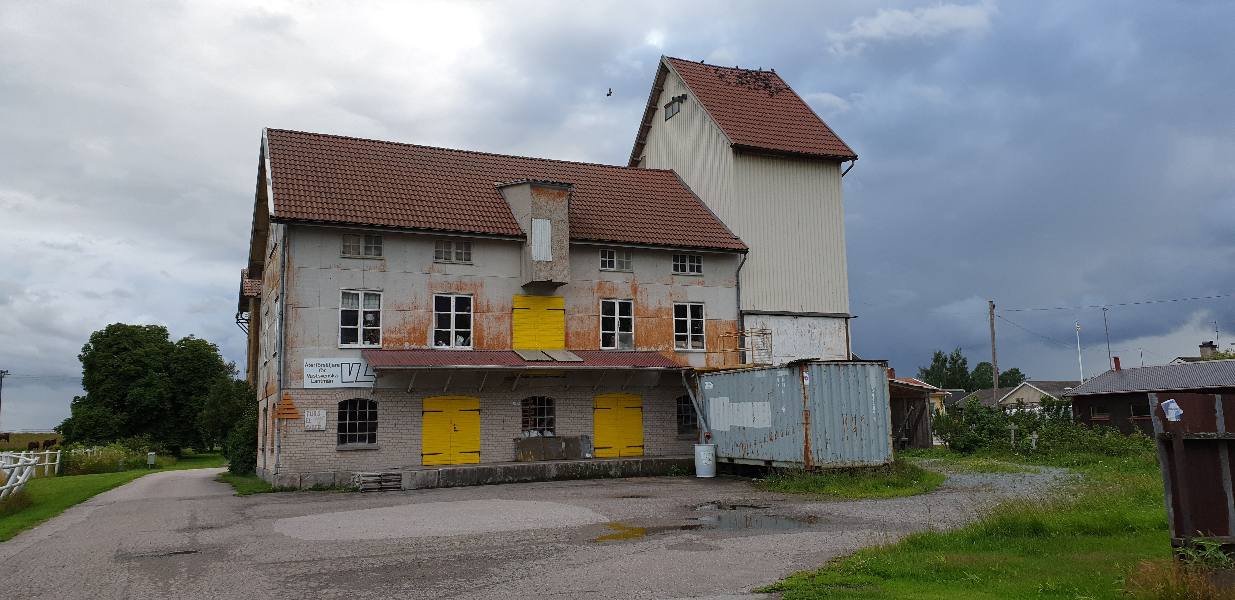 Elektrisk mjölkvarn